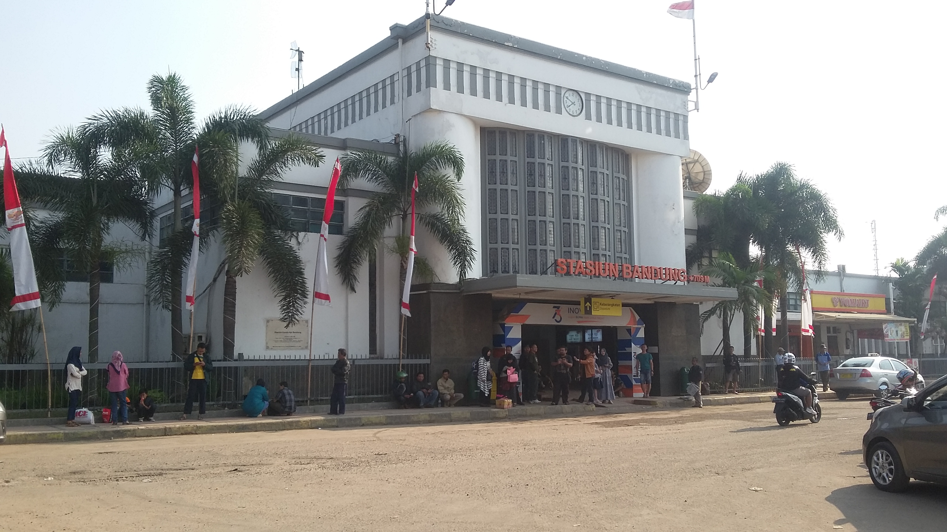 Stasiun Bandung pintu selatan